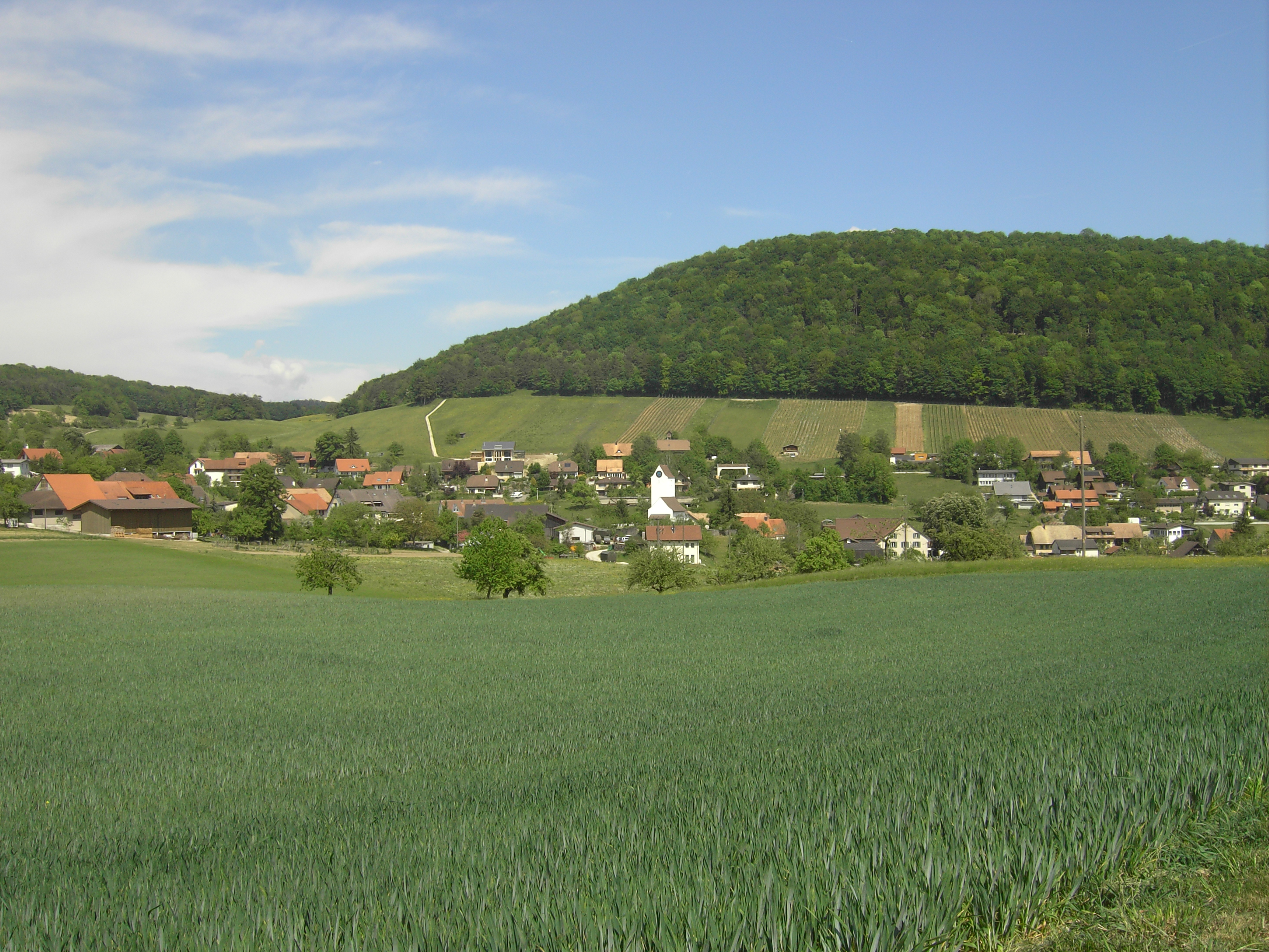 Mönthal AG, Schweiz